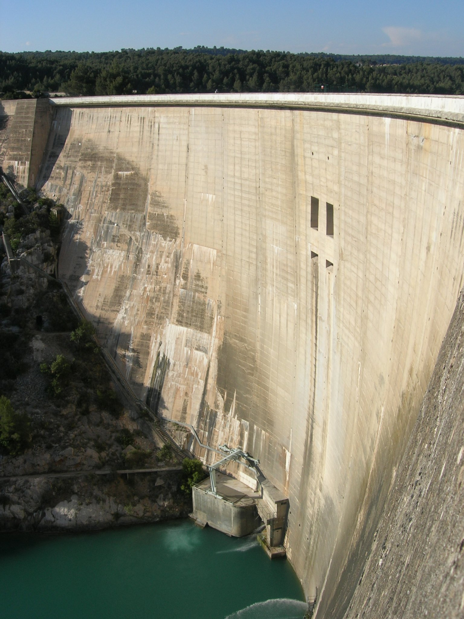 Photographie du barrage de Bimont, commune de Saint-Marc-Jaumegarde, Bouches-du-Rhône, France.